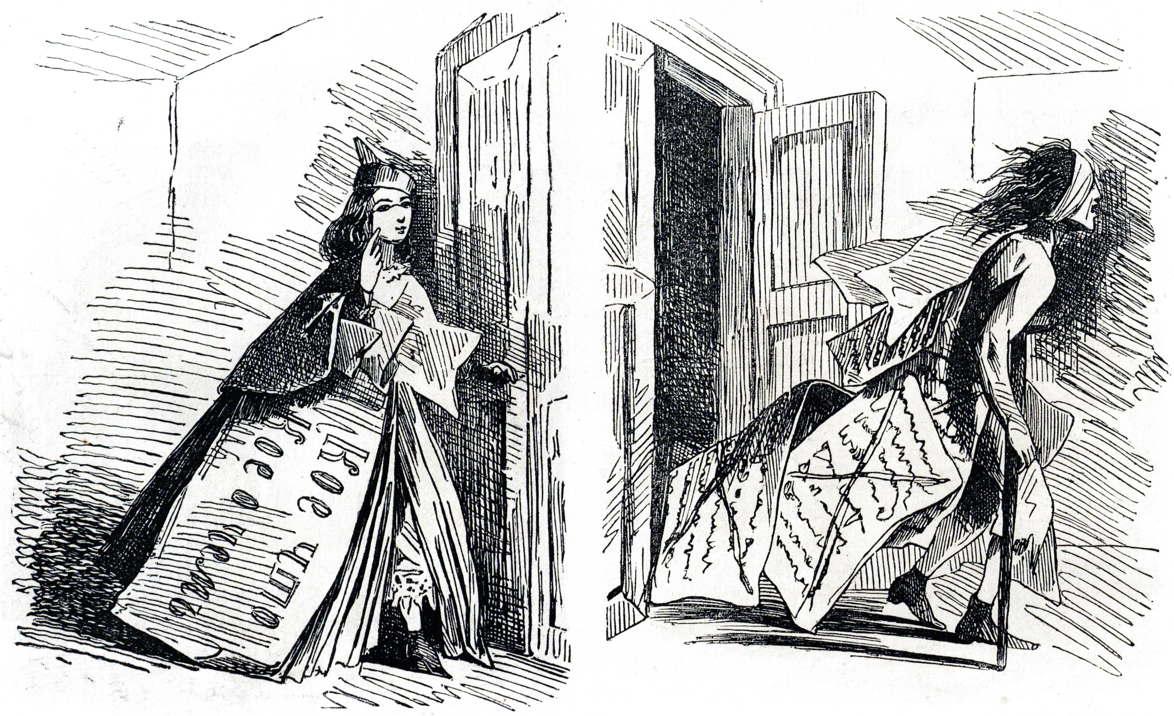 Карикатура Аполлона Б. "Искра", 1863 г., №34 (675), стр. 456. Гравёр: П. Куренков Слева: Статья до просмотра цензурой Справа: Статья процензурированная